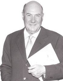 La foto raffigura Antonino Giuffrè, fondatore della dott. A. Giuffrè Editore s.p.a. nel 1931.